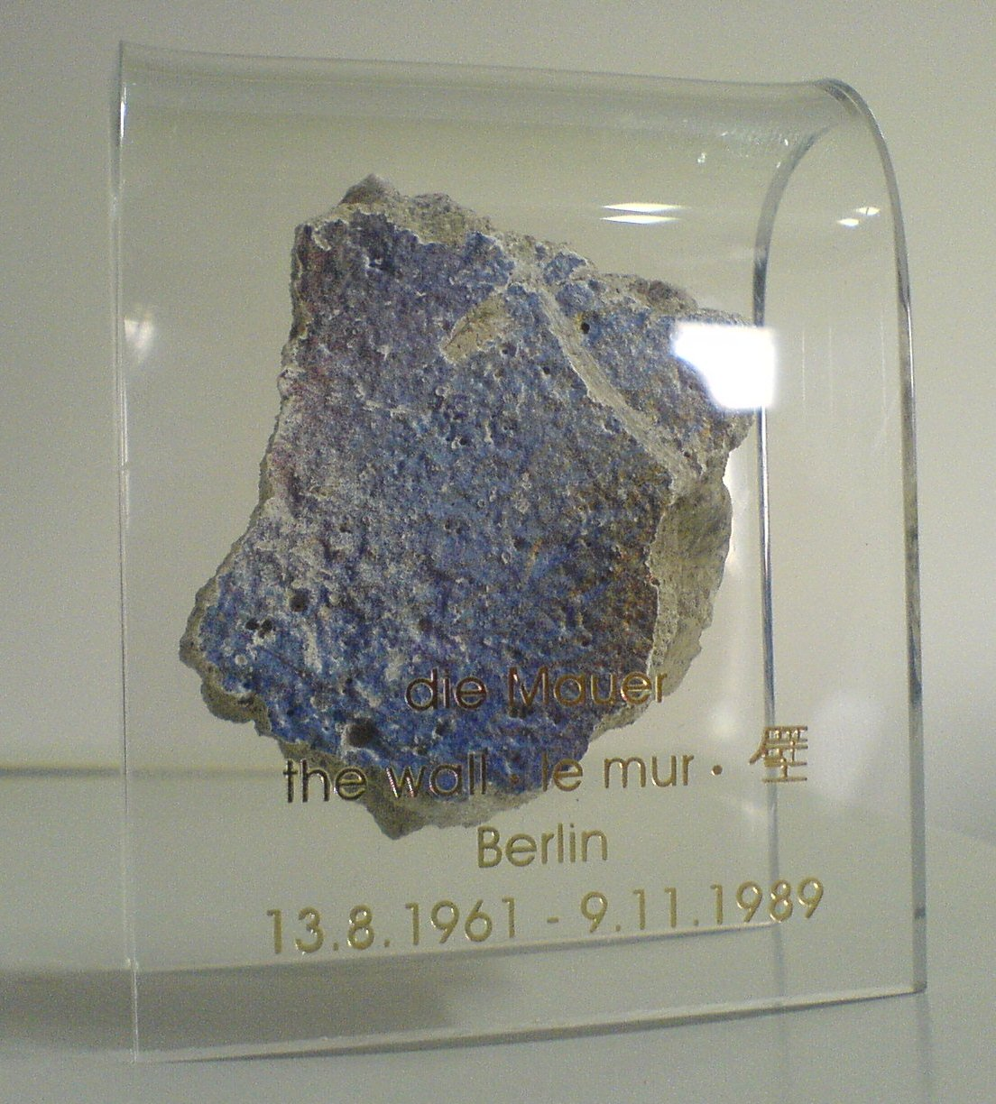 Berlin Duvarindan bir parca